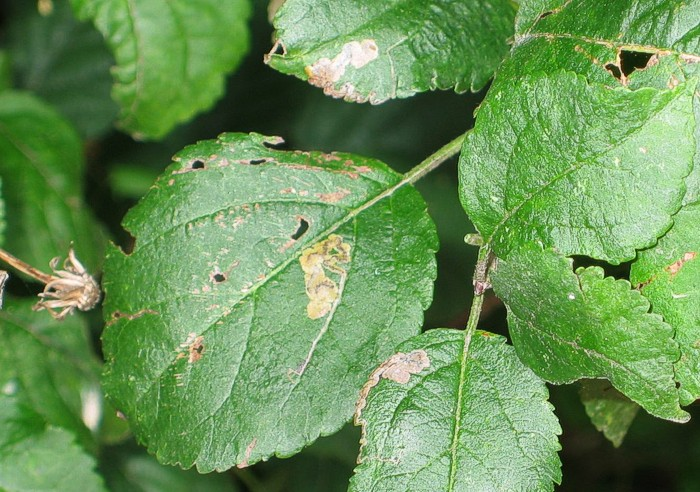 Mine von Stigmella desperatella